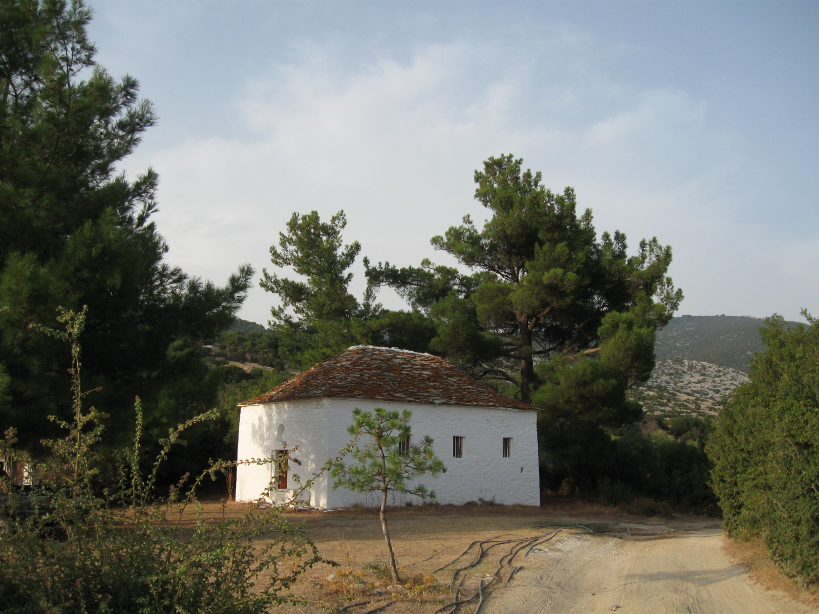 Ag. Georgios (2008)